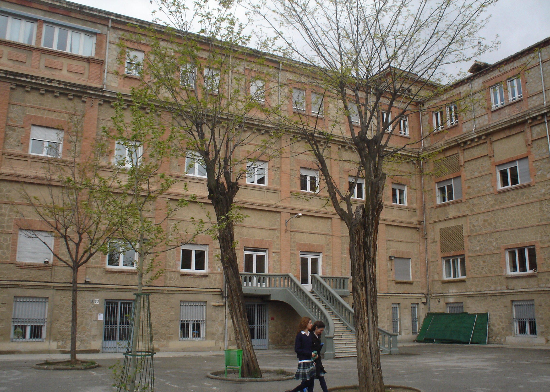 Patio del Colegio Sagrado Corazón de Granada (España)